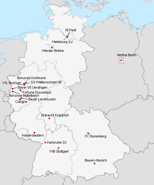 Répartition des clubs en 1.Bundesliga 1990-1991.